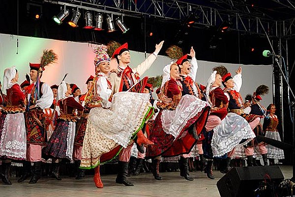 Święto "Śląska" organizowane przez Zespół Pieśni i Tańca Śląsk